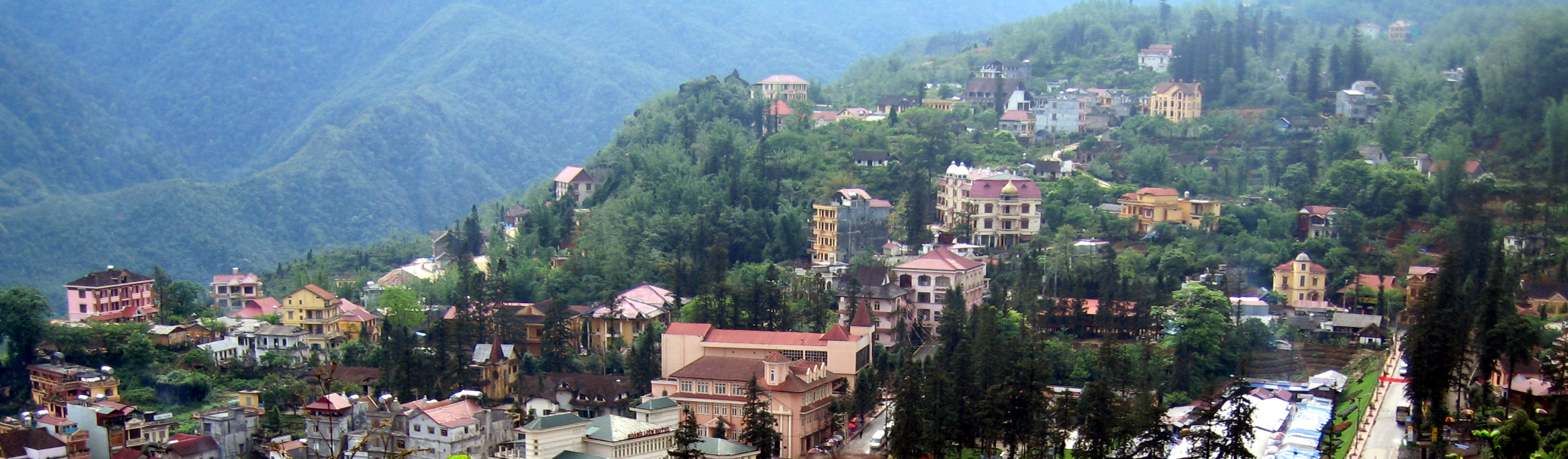 Sa Pa nhìn từ Hàm Rồng